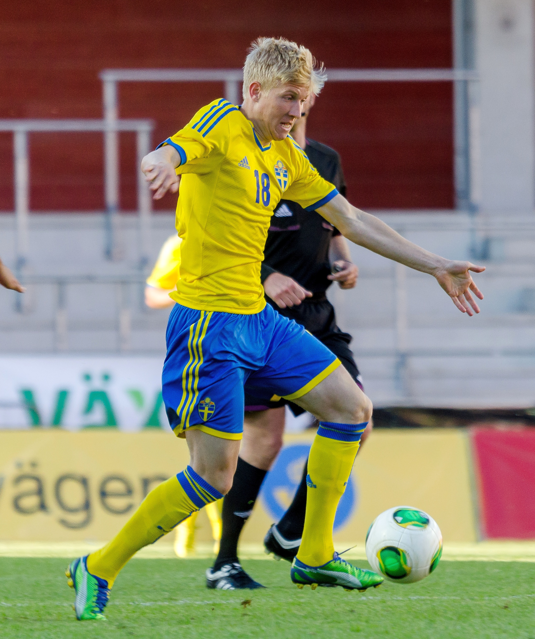 Yttermittfältaen Simon Kroon i det svenska U21-landslagets 3-2 seger mot Schweiz i en träninglandskamp på Myresjöhus Arena i Växjö, 6/6 2013.